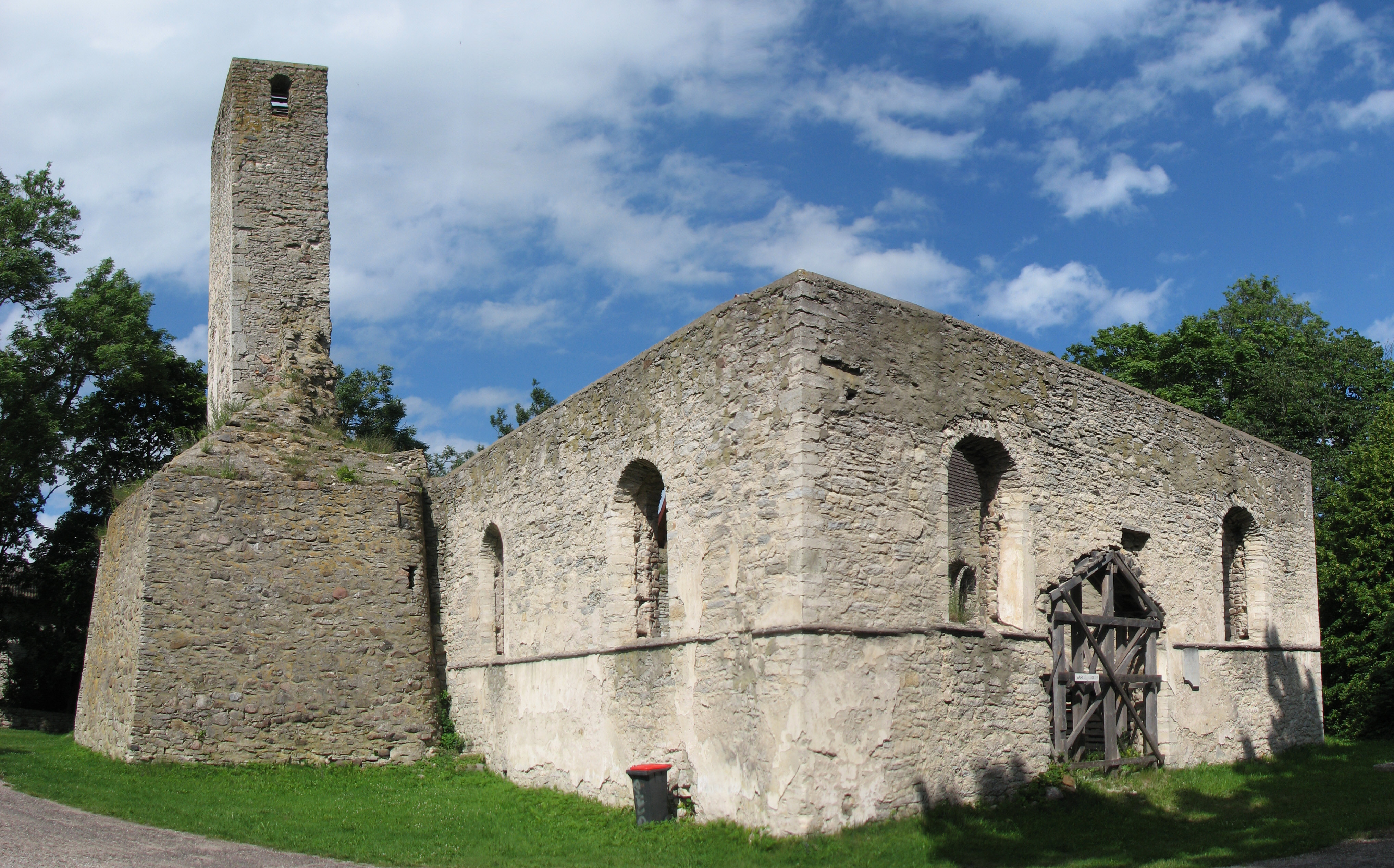 Käina Martin's Church ruins, Käina, Hiiumaa, Estonia